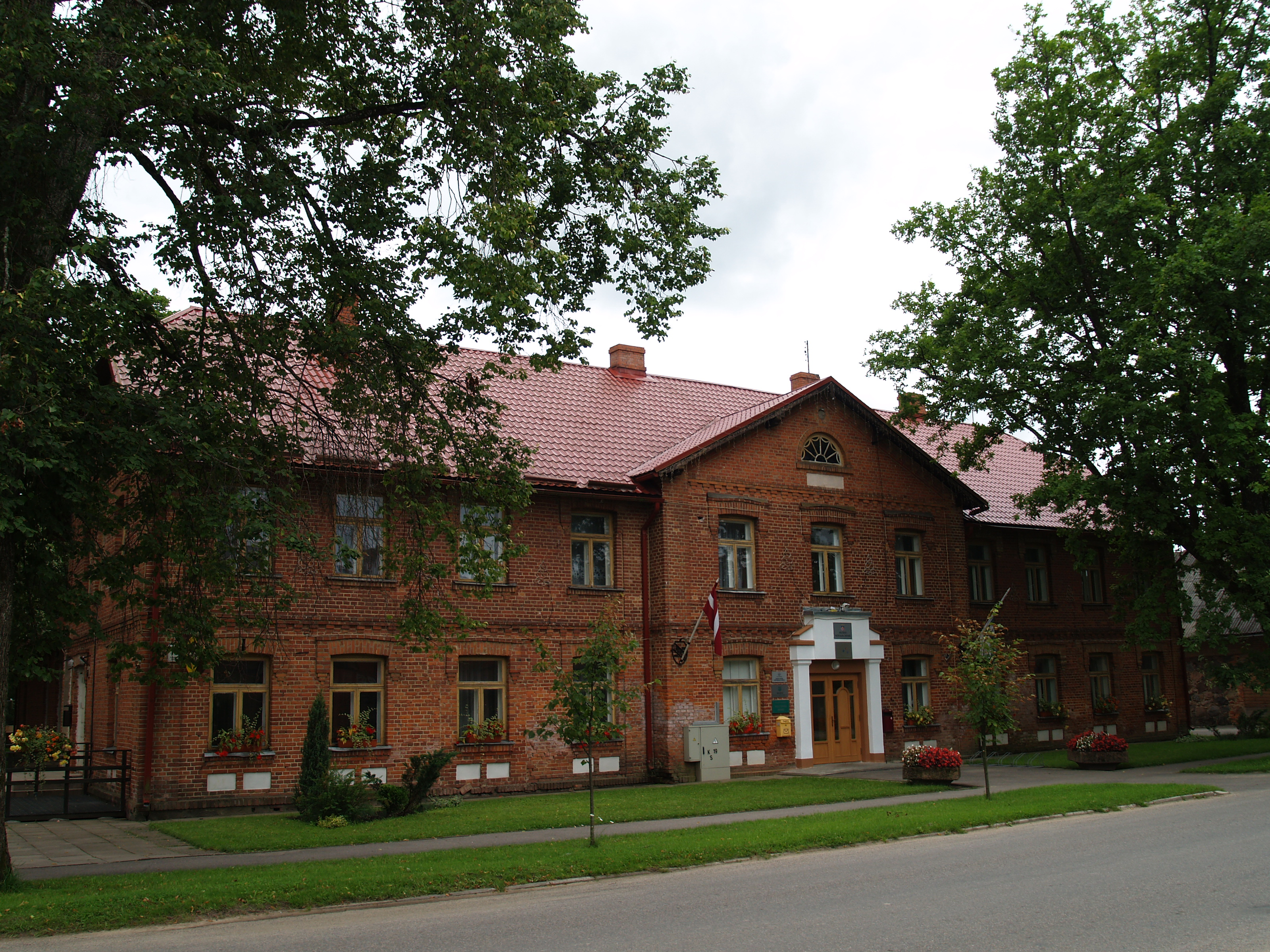 Aloja kultuurimaja ja piirkonnakeskuse hoone.